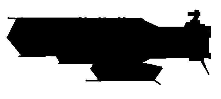 Perfil de la nave SDF-4 (Robotech)